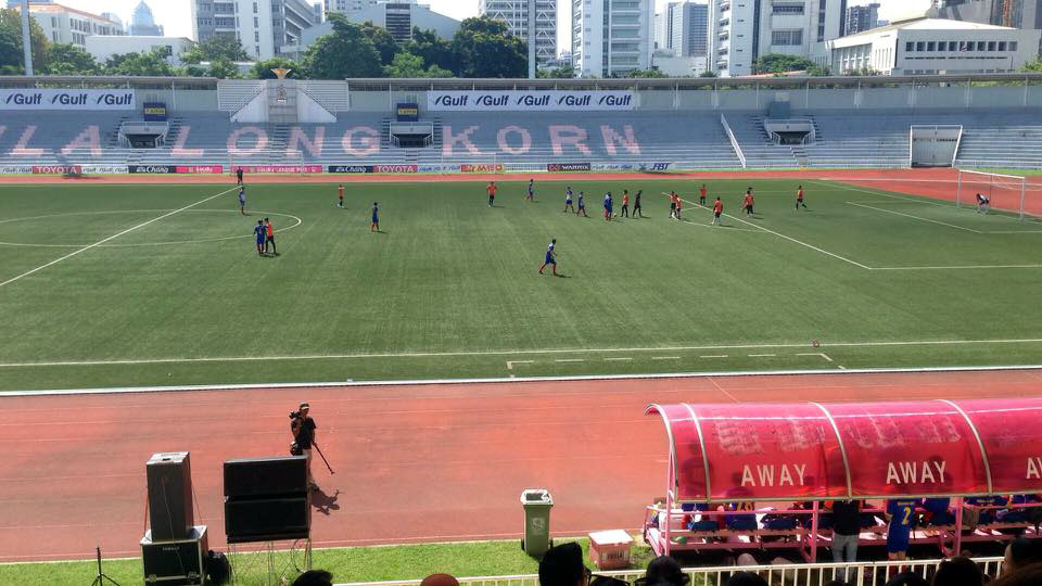 Chulalongkorn University Stadion